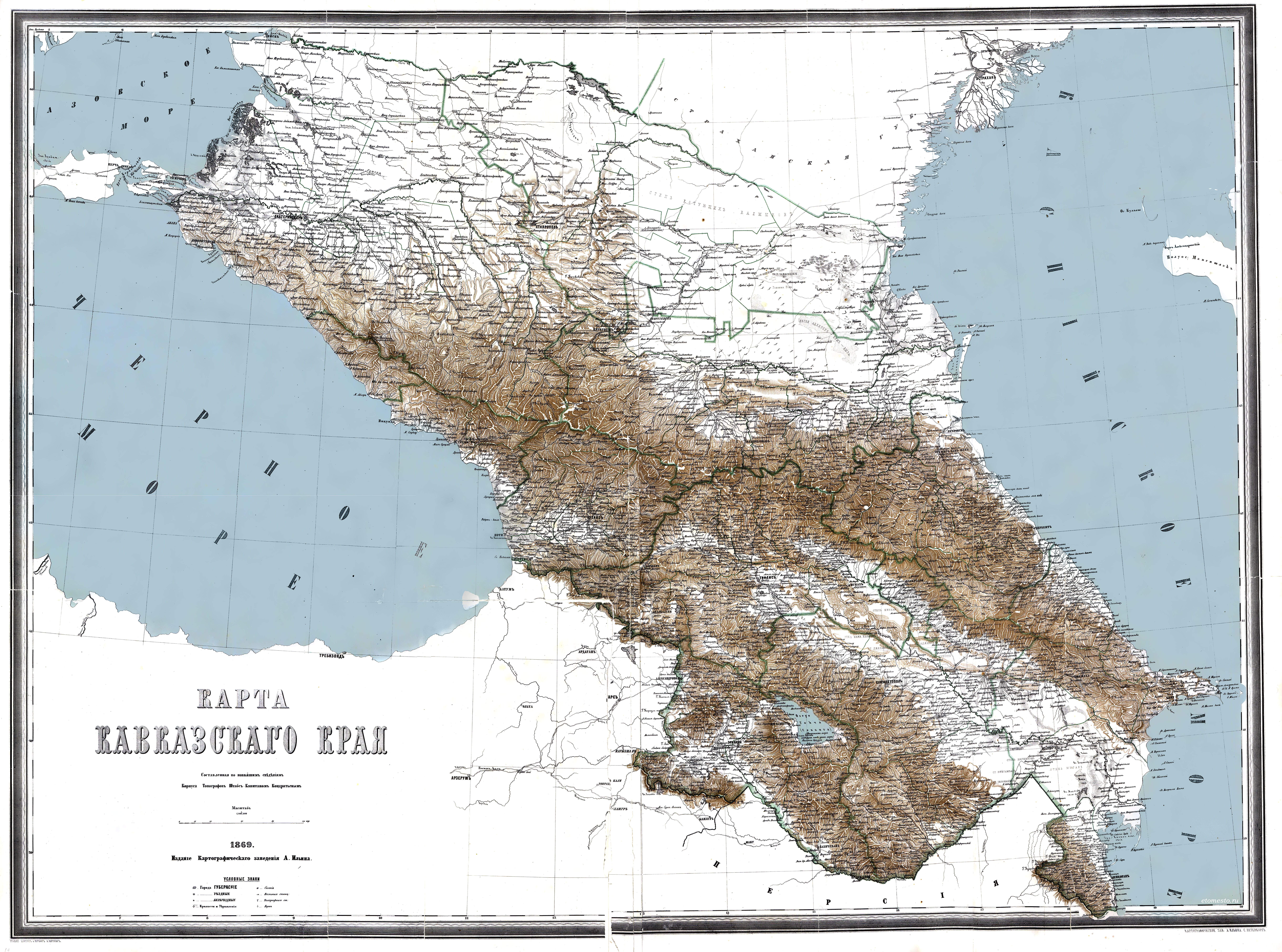 Атлас Российской империи 1871 г., Подробная карта Кавказского края с прилегающими частями Турции и Персии, 1869 г. (Масштаб: 5 верст в дюйме)